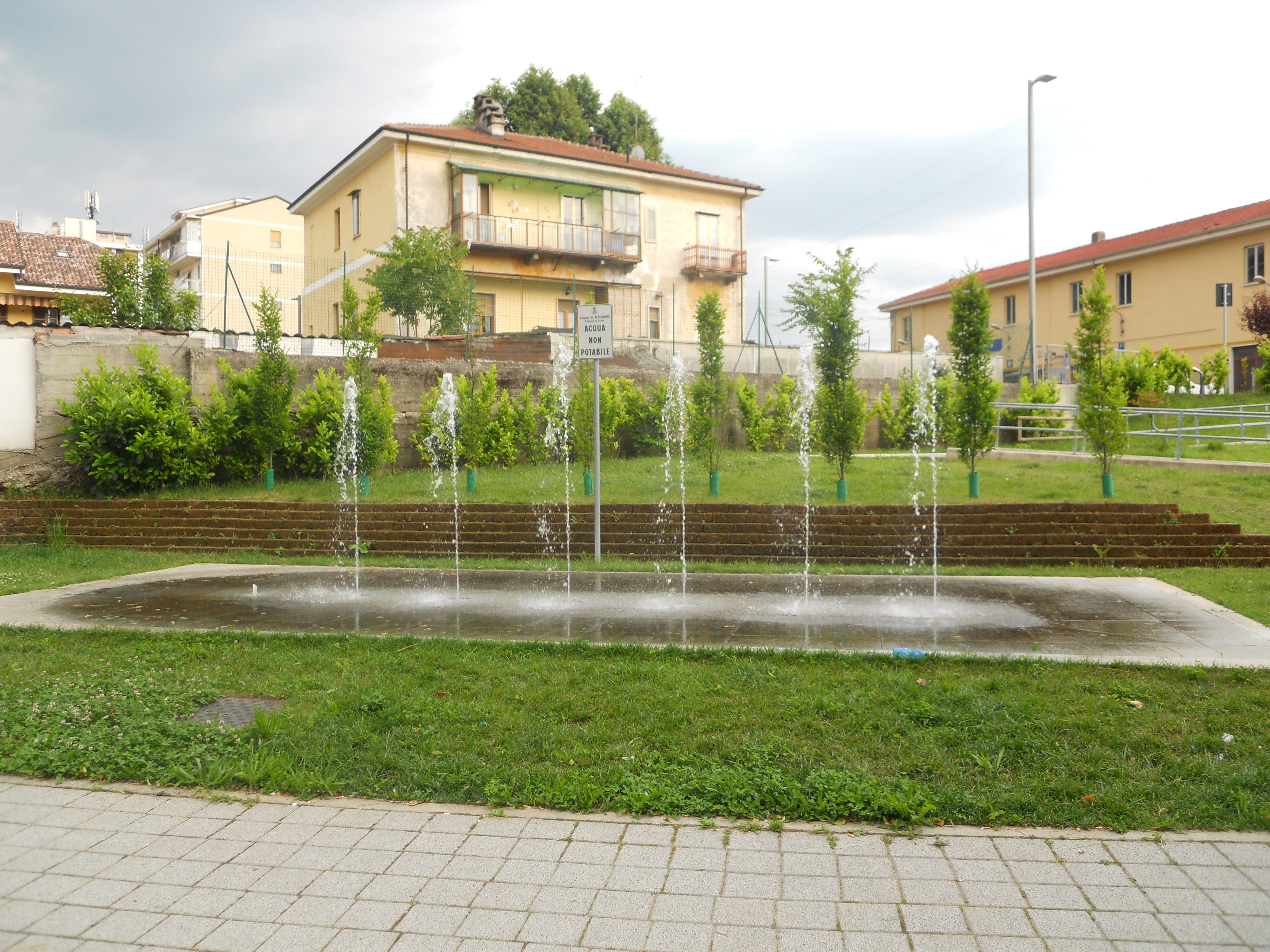 Fontana antistante la stazione